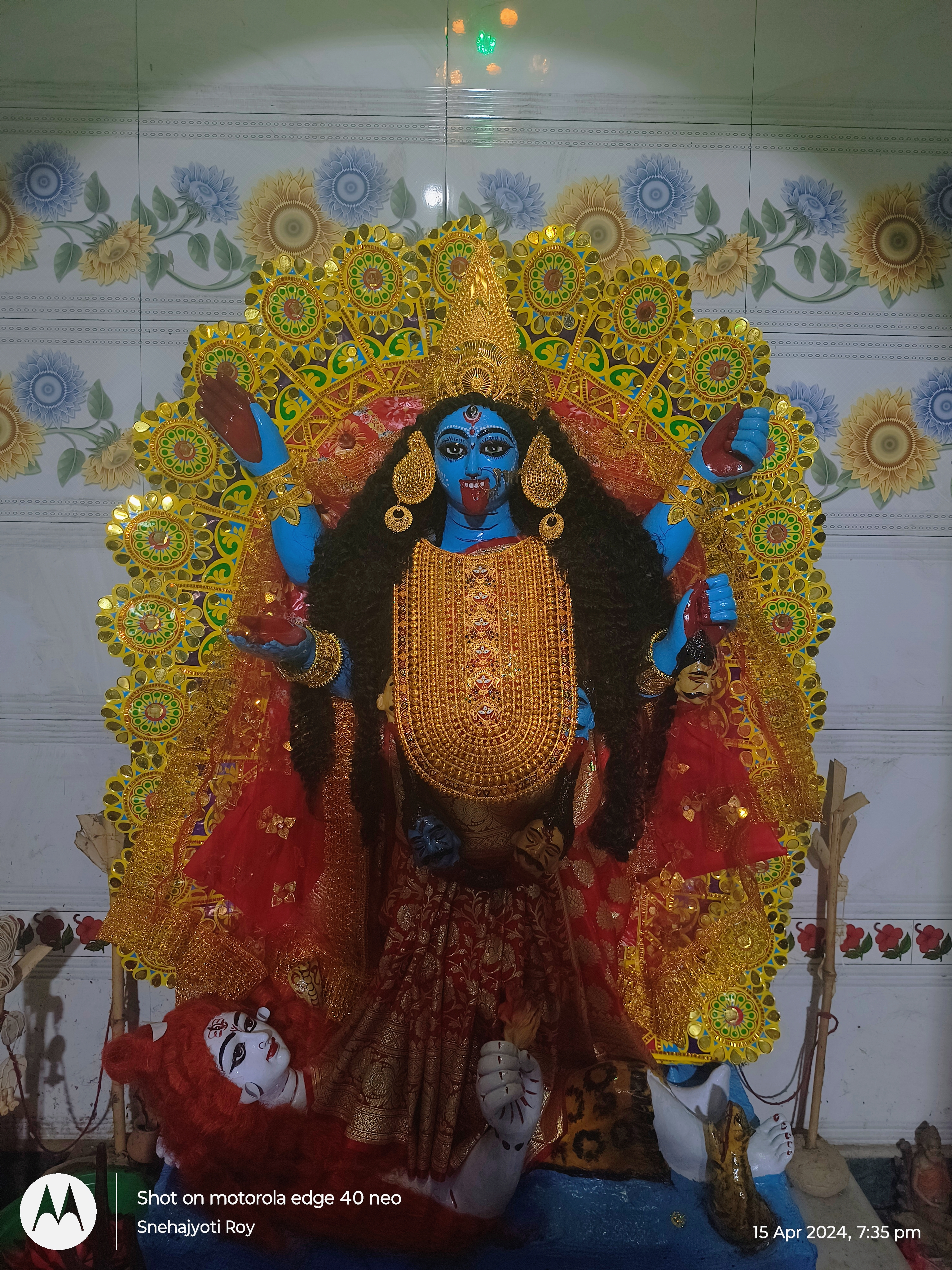 Kali